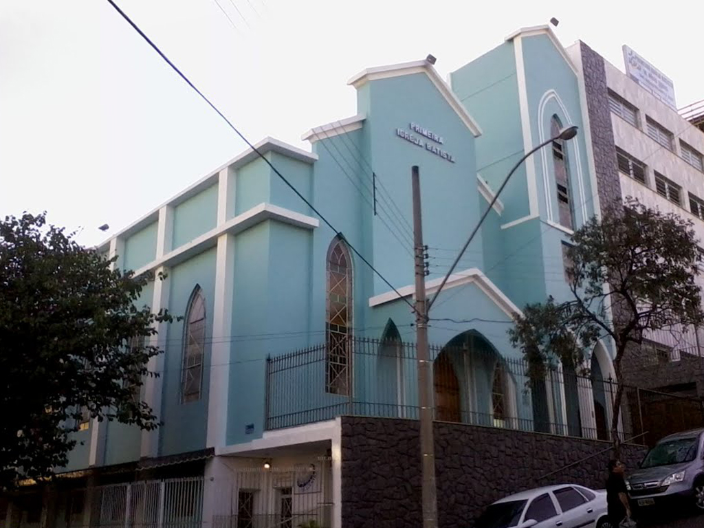 Templo I - Esta foto ilustra a primeira edificação da igreja, construída e inaugurada no dia 12 de outubro de 1927. Ao lado da igreja, é possível perceber os andares do prédio de Educação Religiosa edificado durante o ministério do Pr. Romilton Garcia Brasil.